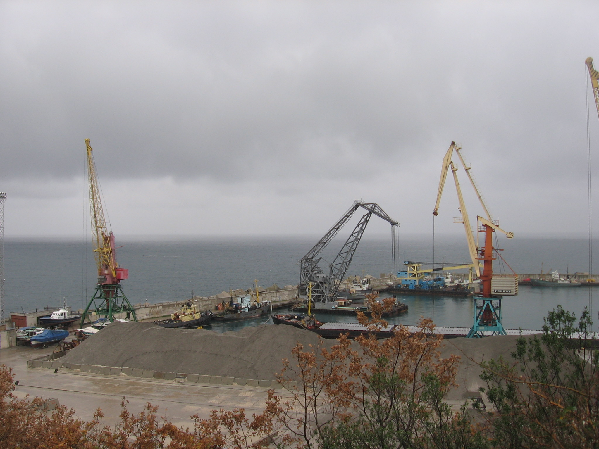 Ялтинский грузовой порт, Крым